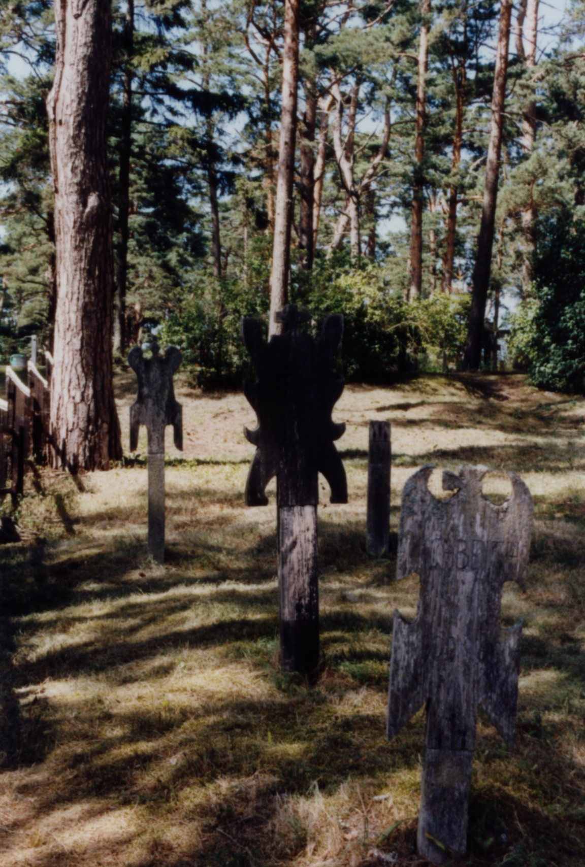 Grabtafeln